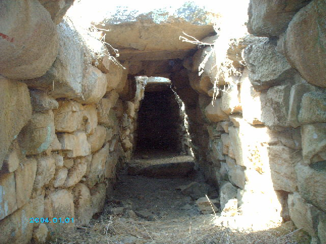 veduta interno tomba s.cosimo gonnosfanadiga